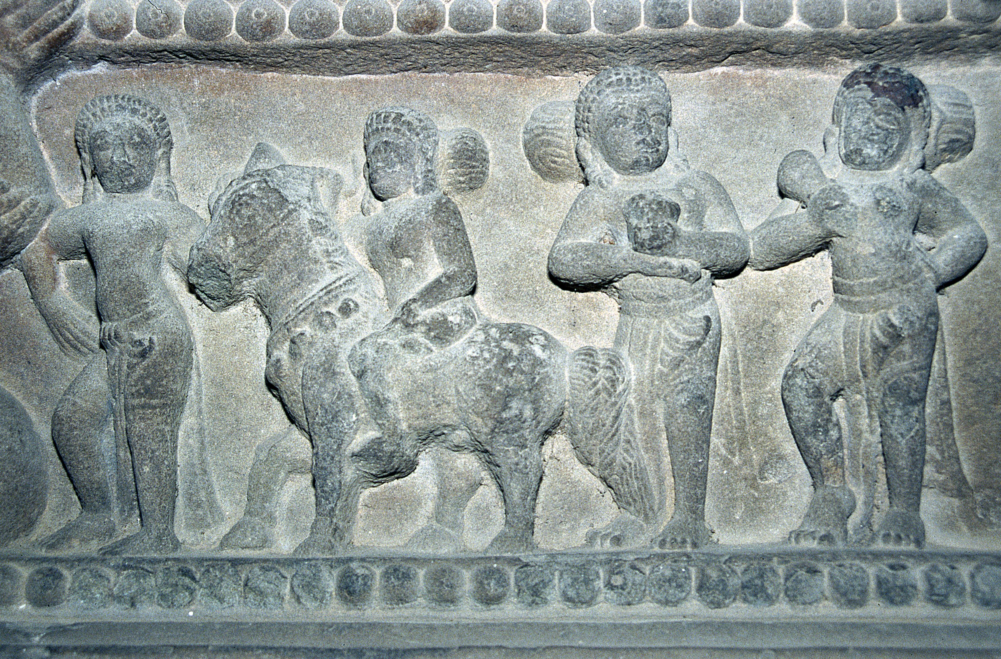 Da Nang: Cham-Museum